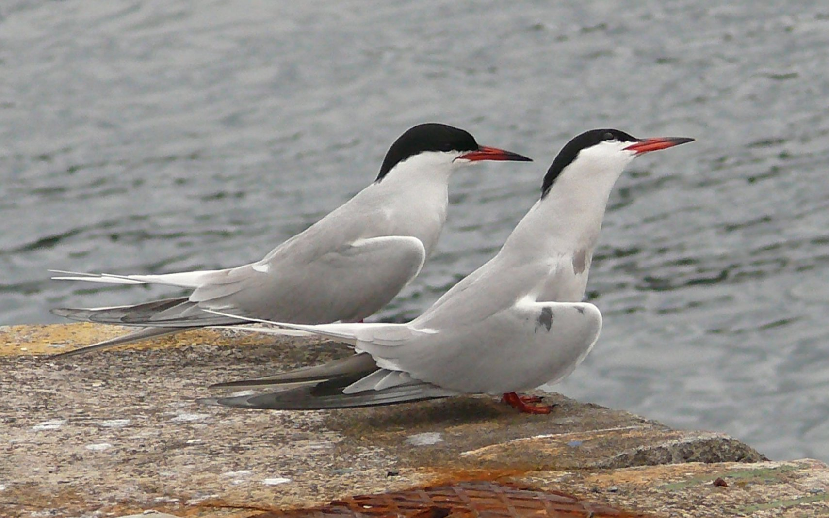 Coppia di sterne comuni durante il corteggiamento